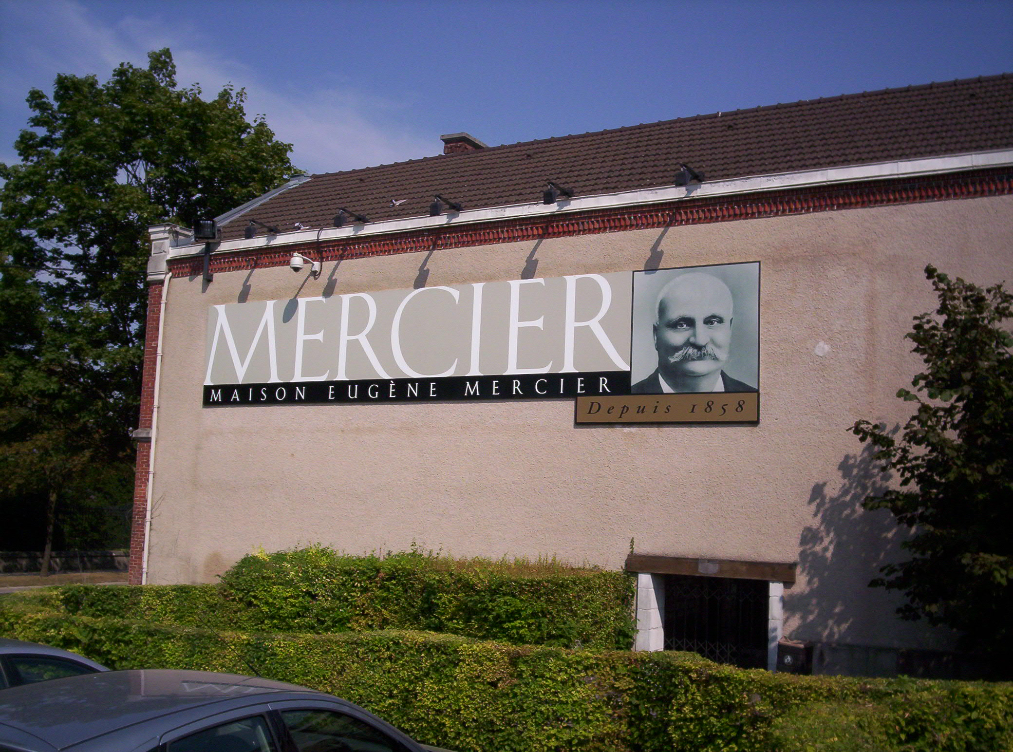 Visite des Caves Mercier à Épernay (Marne, France)